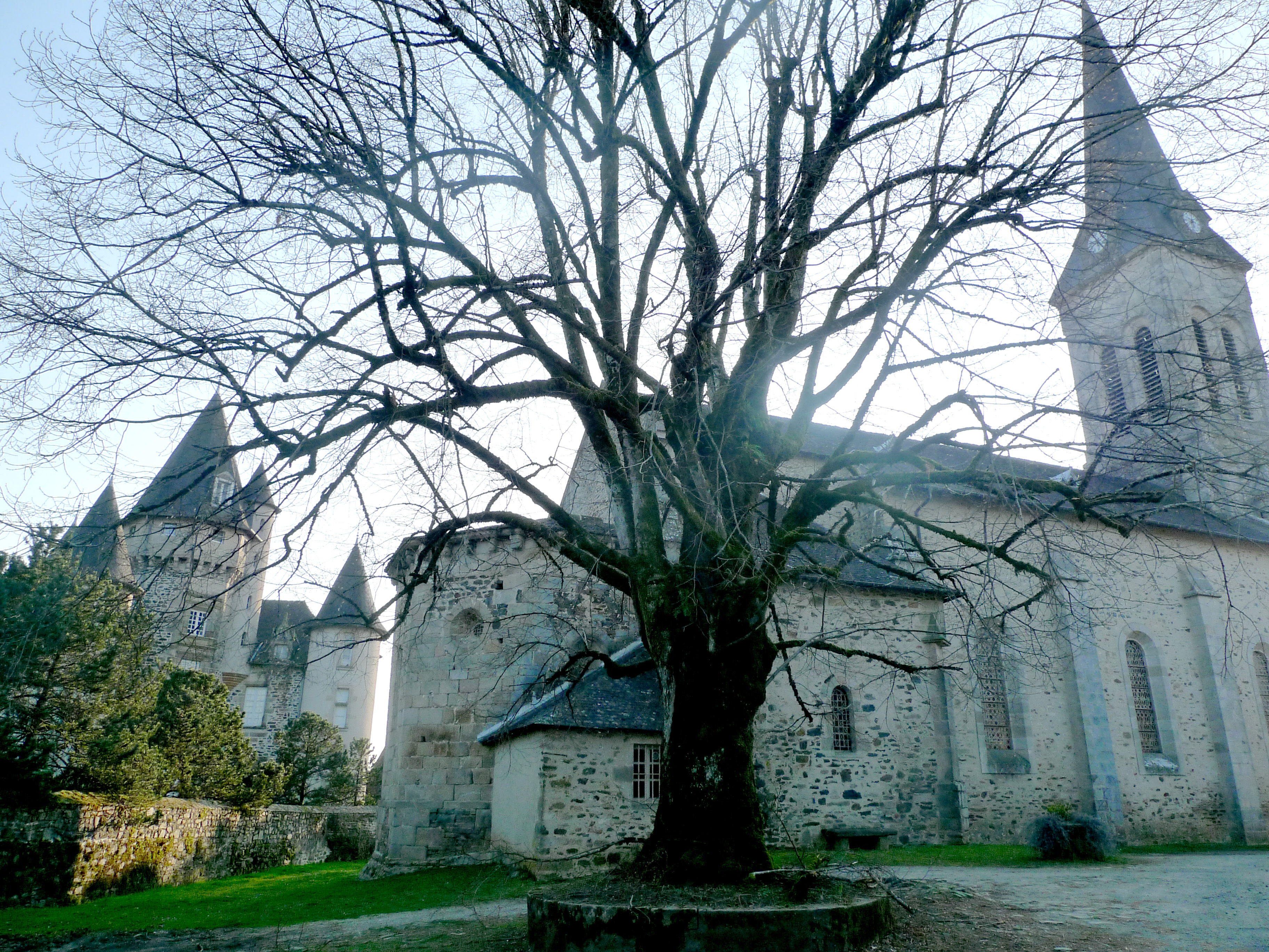 Eglise et chateau